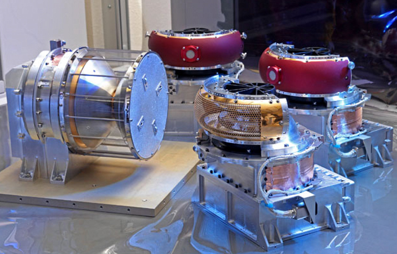 Détecteurs de particules énergétiques JADE de la sonde spatiale JUNO de la NASA